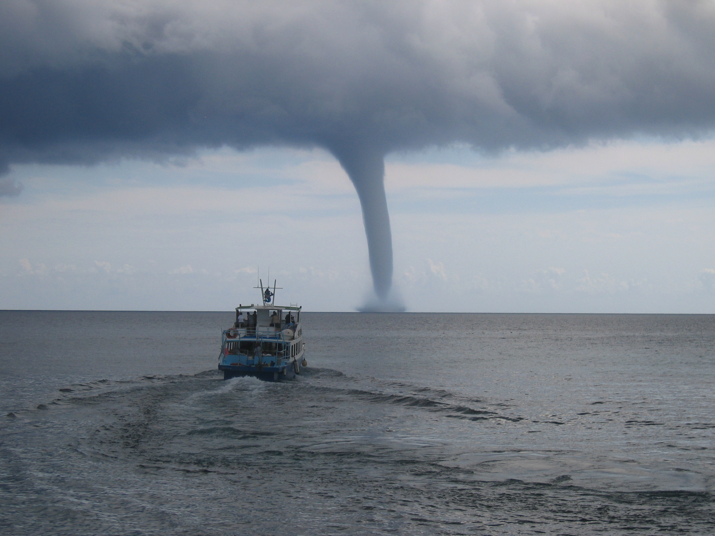 Vodní smršť u Cala Rajada, Mallorca, Španělsko.